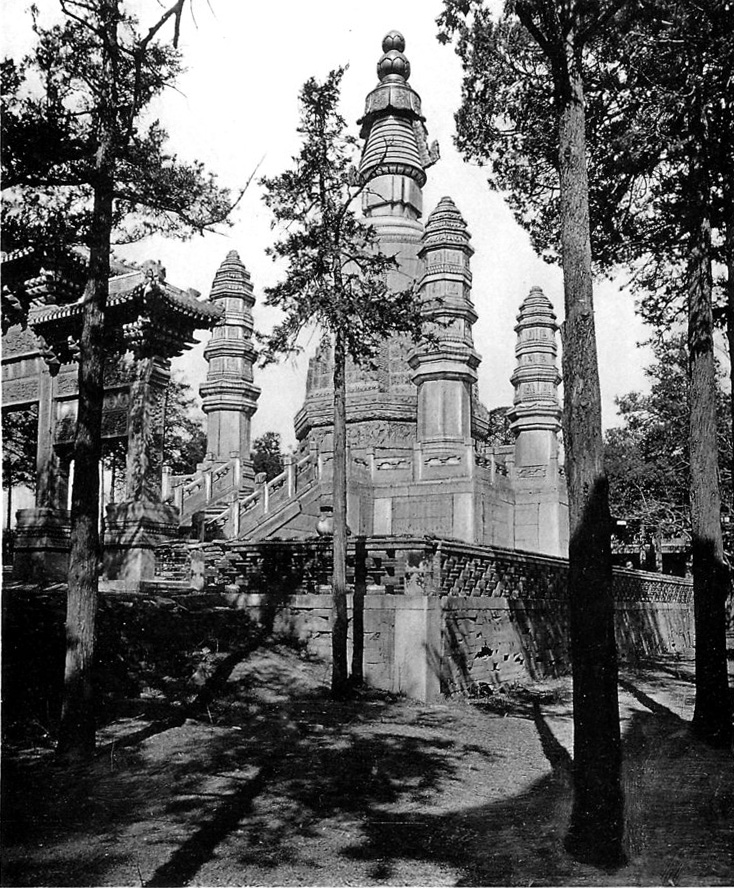 photo from Ein Tagebuch in Bildern